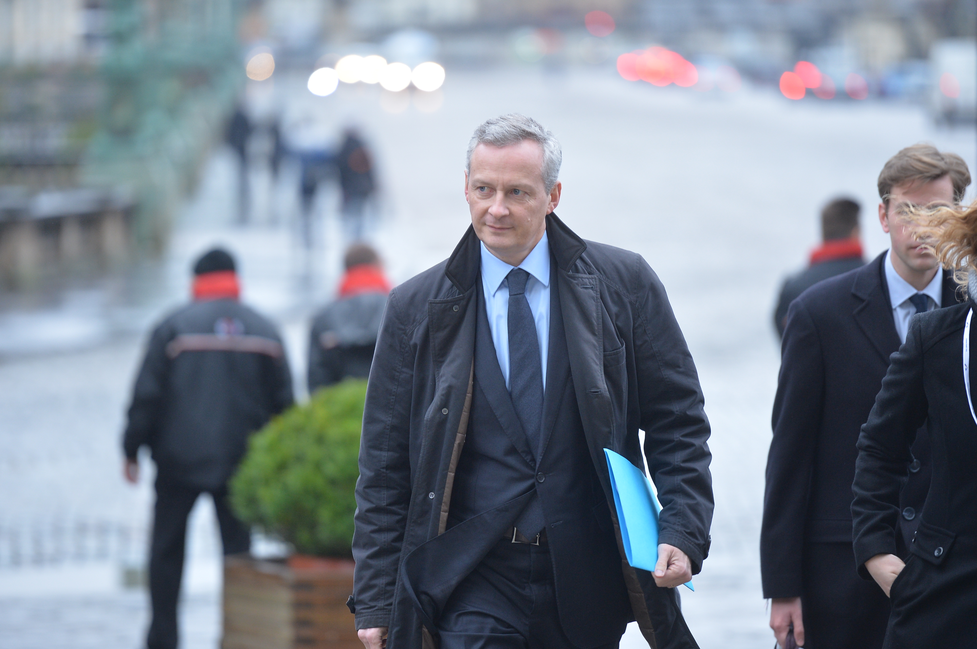 EPP Summit, Brussels; December 2014